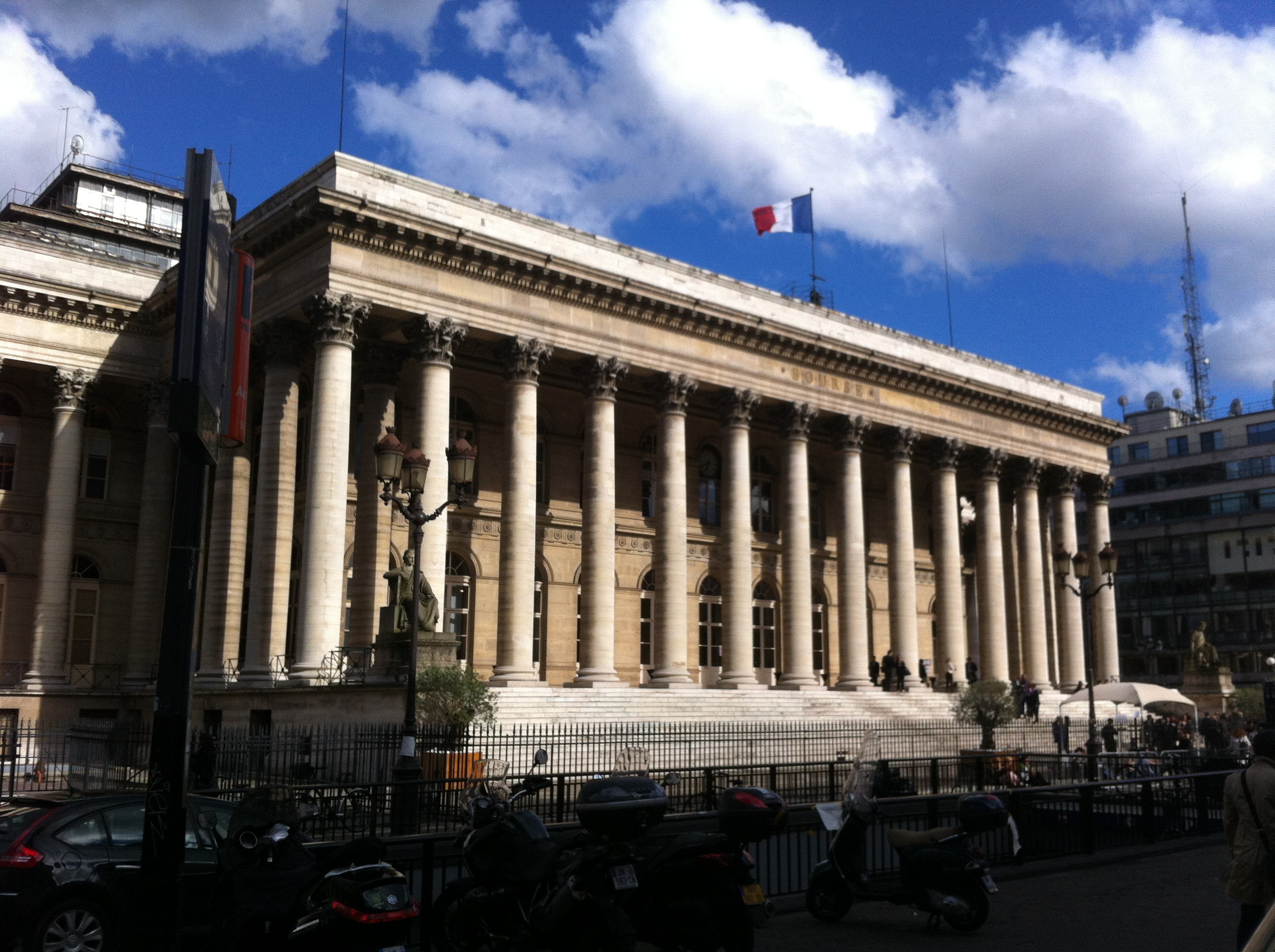 Palais Brongniart .